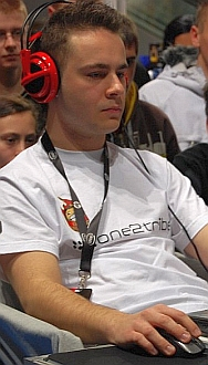 Mateusz Ożga podczas Poznań Game Arena